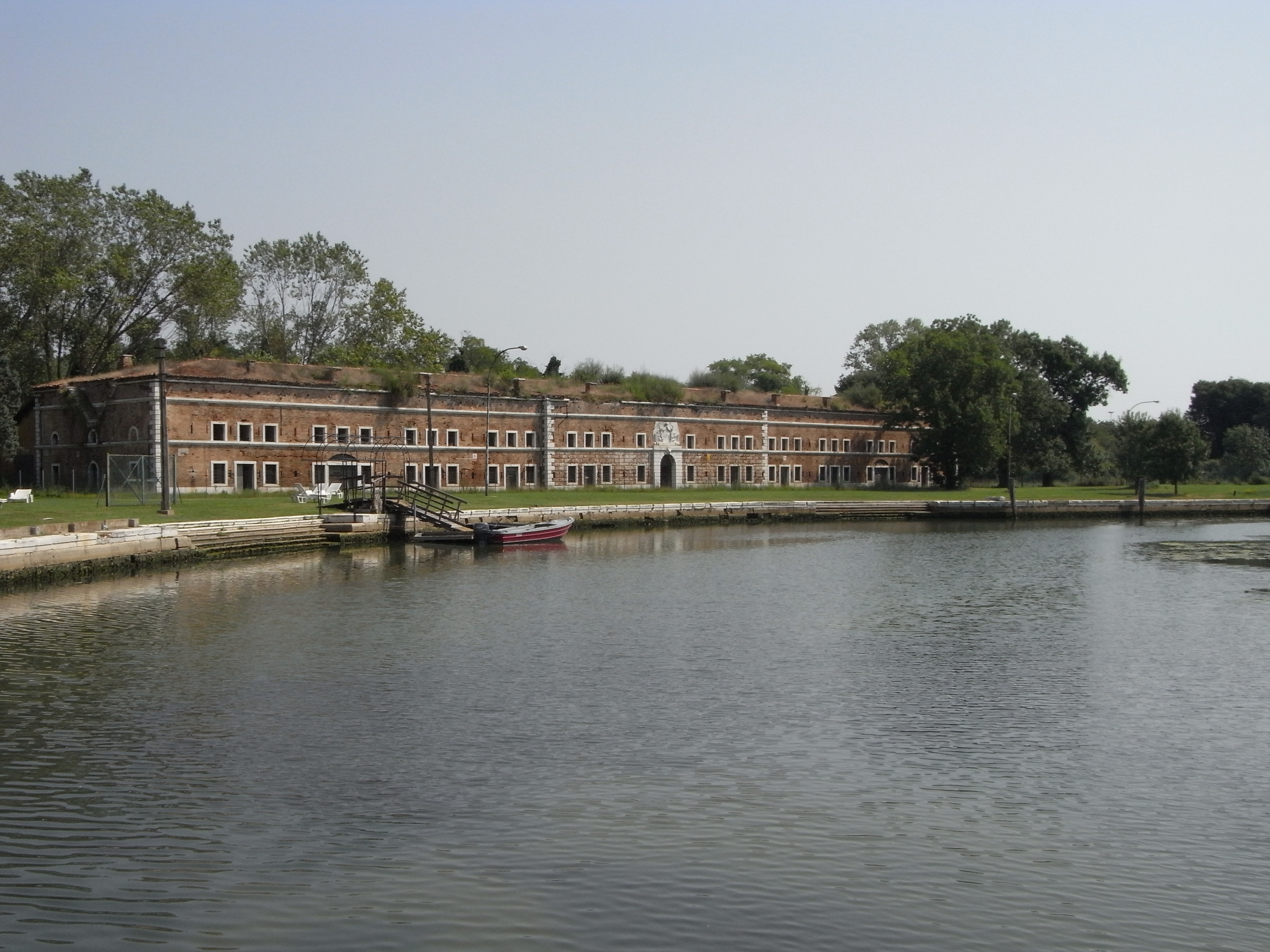 Festung Marghera, Anlegestelle